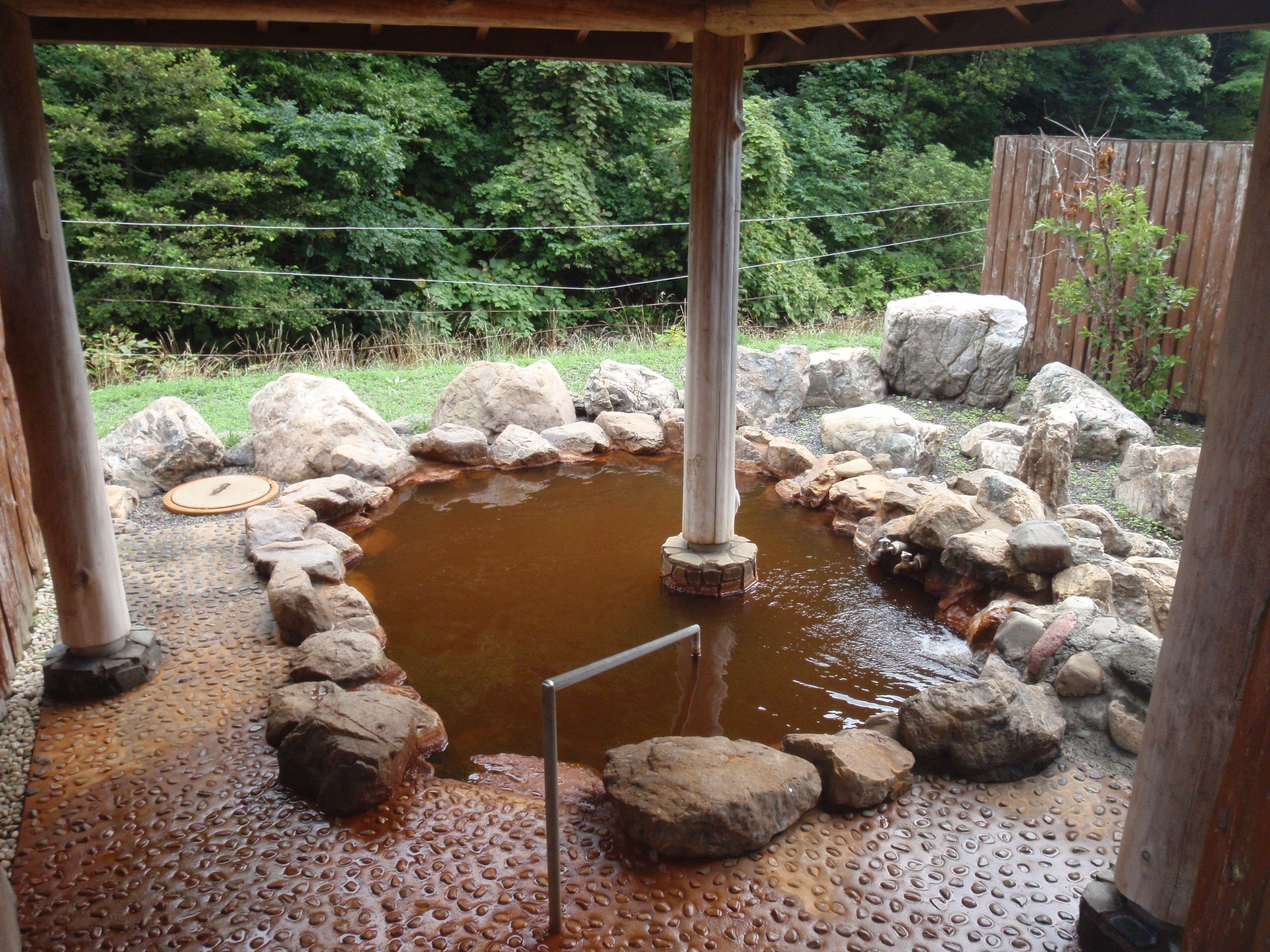 貝取澗温泉、あわび山荘露天風呂